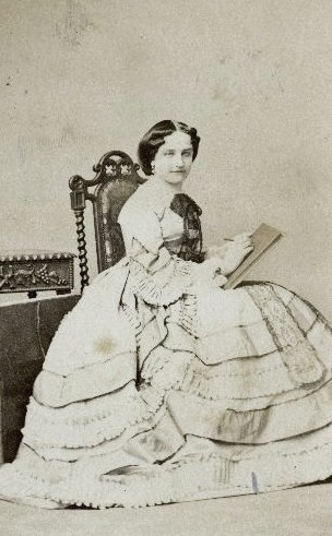 Баронессой Мария Фредерика фон Зедделер (1825—1868), жена князя А. П. Барклай-де-Толли-Веймарна.